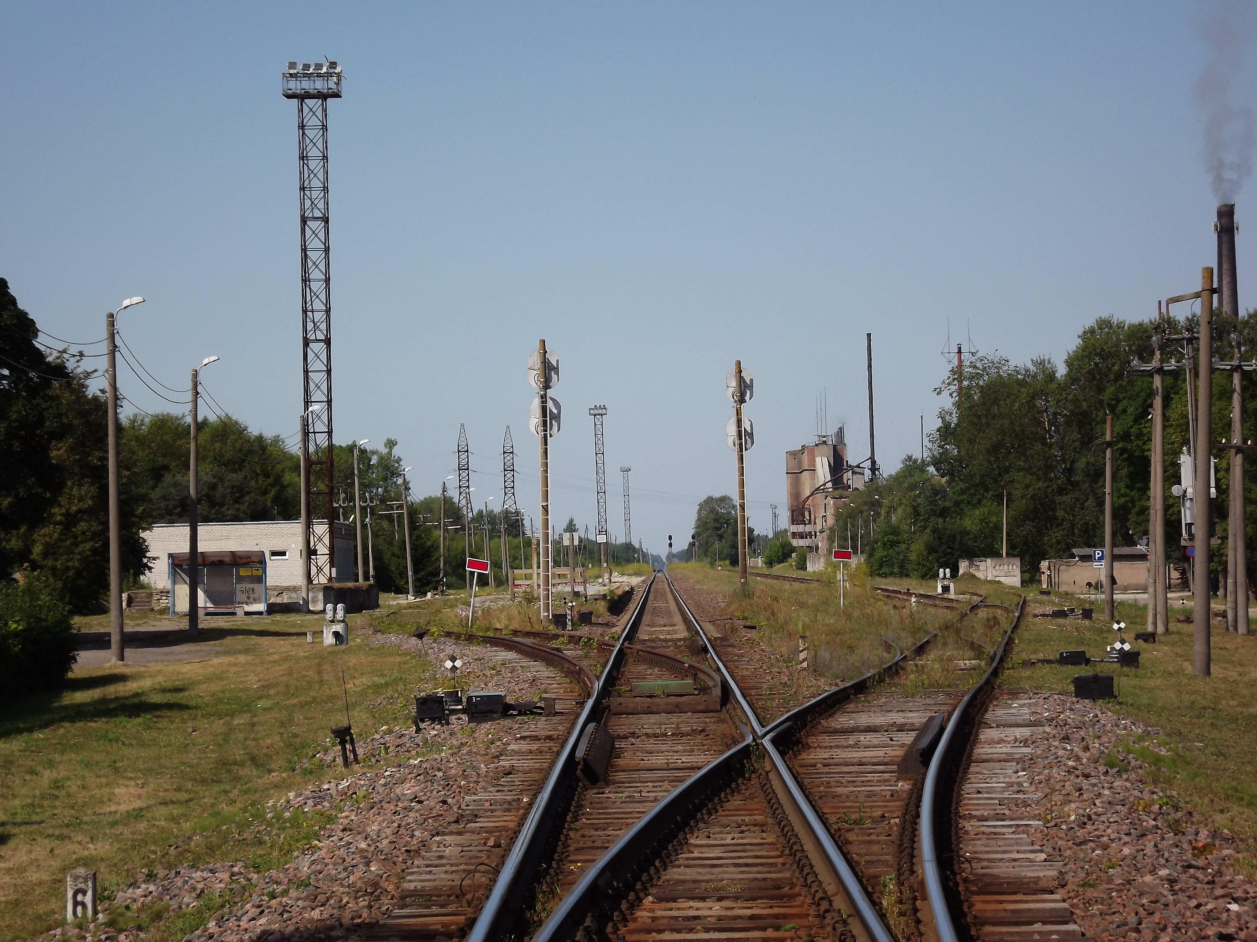 Kiviõli raudteejaam vaatega Narva poolt.